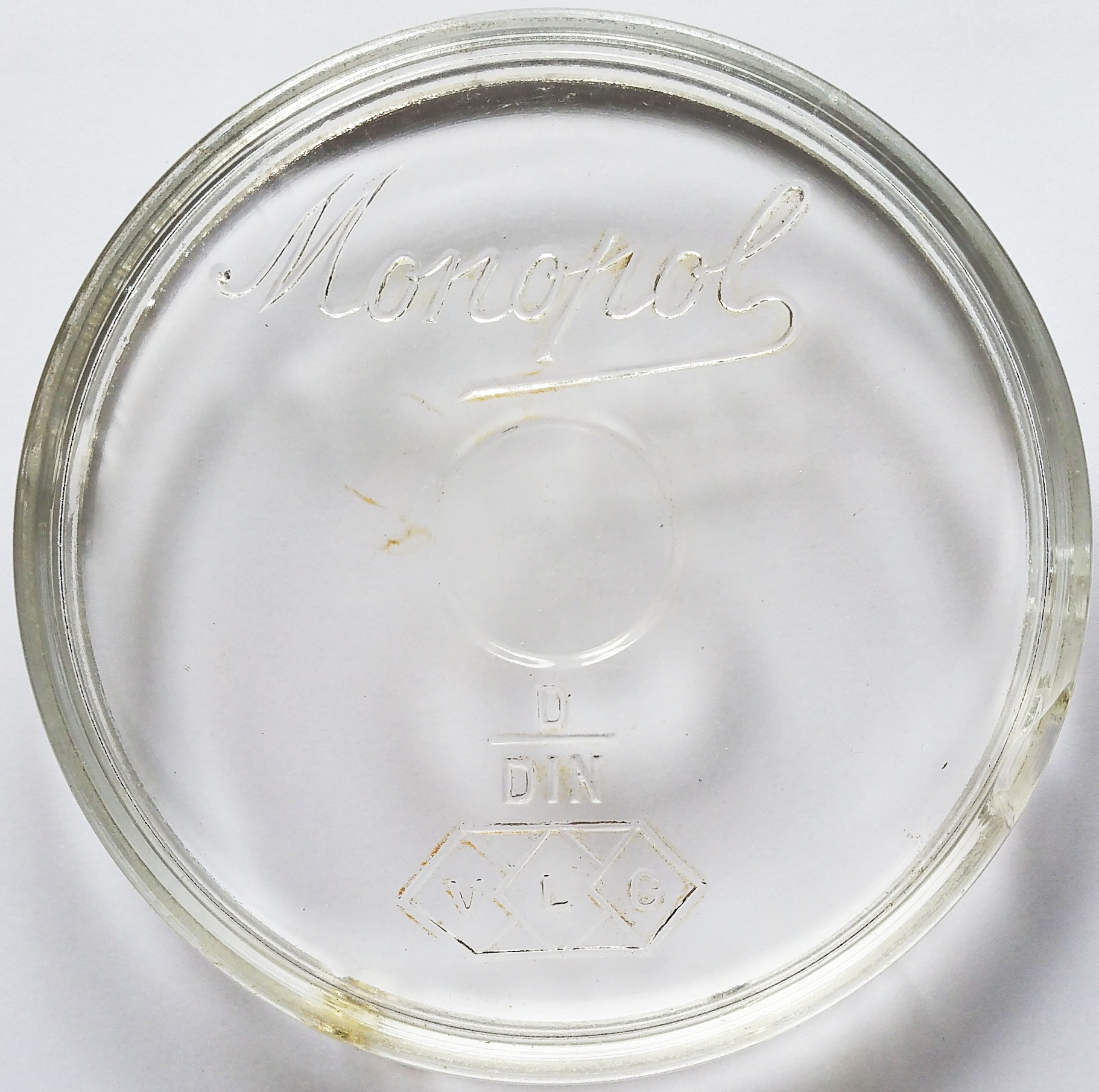 Deckel für ein Einmachglas der Vereinigte Lausitzer Glaswerke Serie Monopol, Pressglas Vor 1946